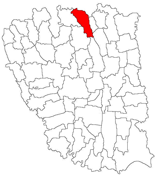 Categorie:Hărţi ale judeţului Galaţi